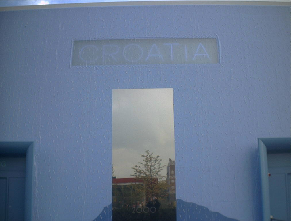 Expo 2000 Croatia